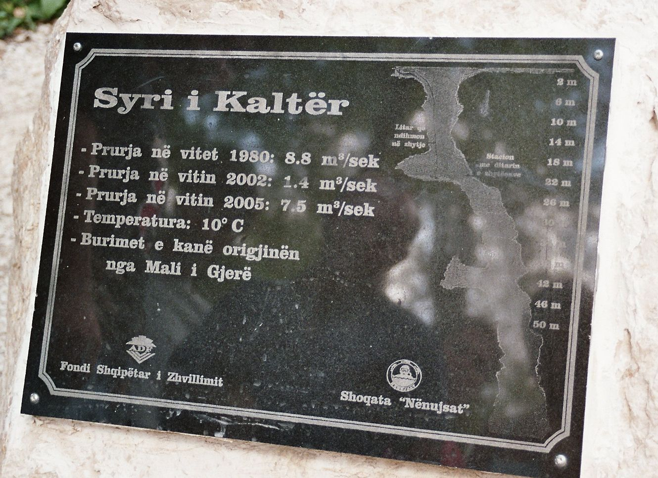 Tafel mit Erläuterungen und Querschnitt des Quelltopfs „Syri Kalter“, angebracht neben der Quelle Decius